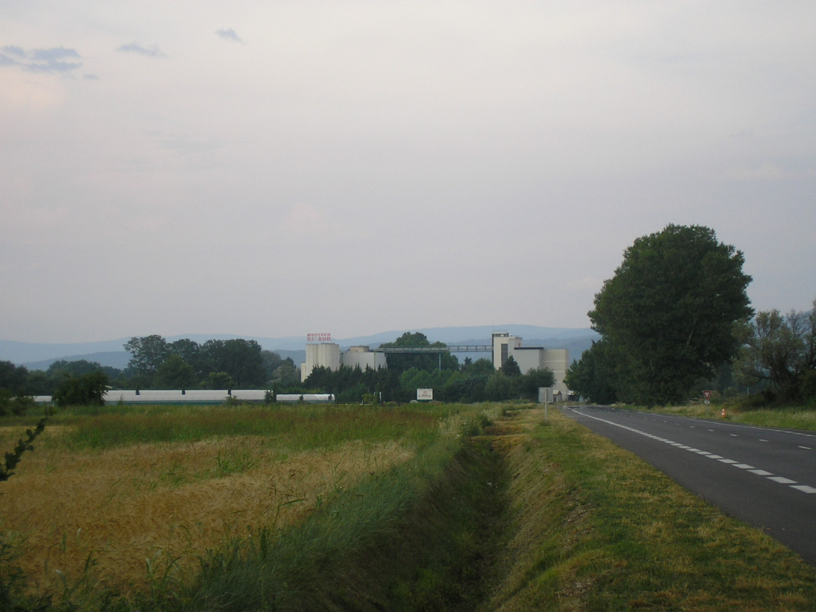 Minoterie Giraud au Thor